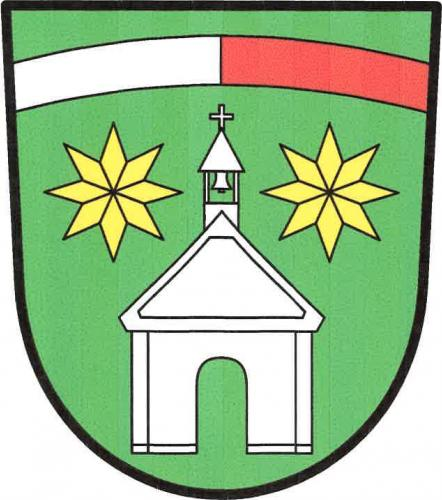 Chlumy znak